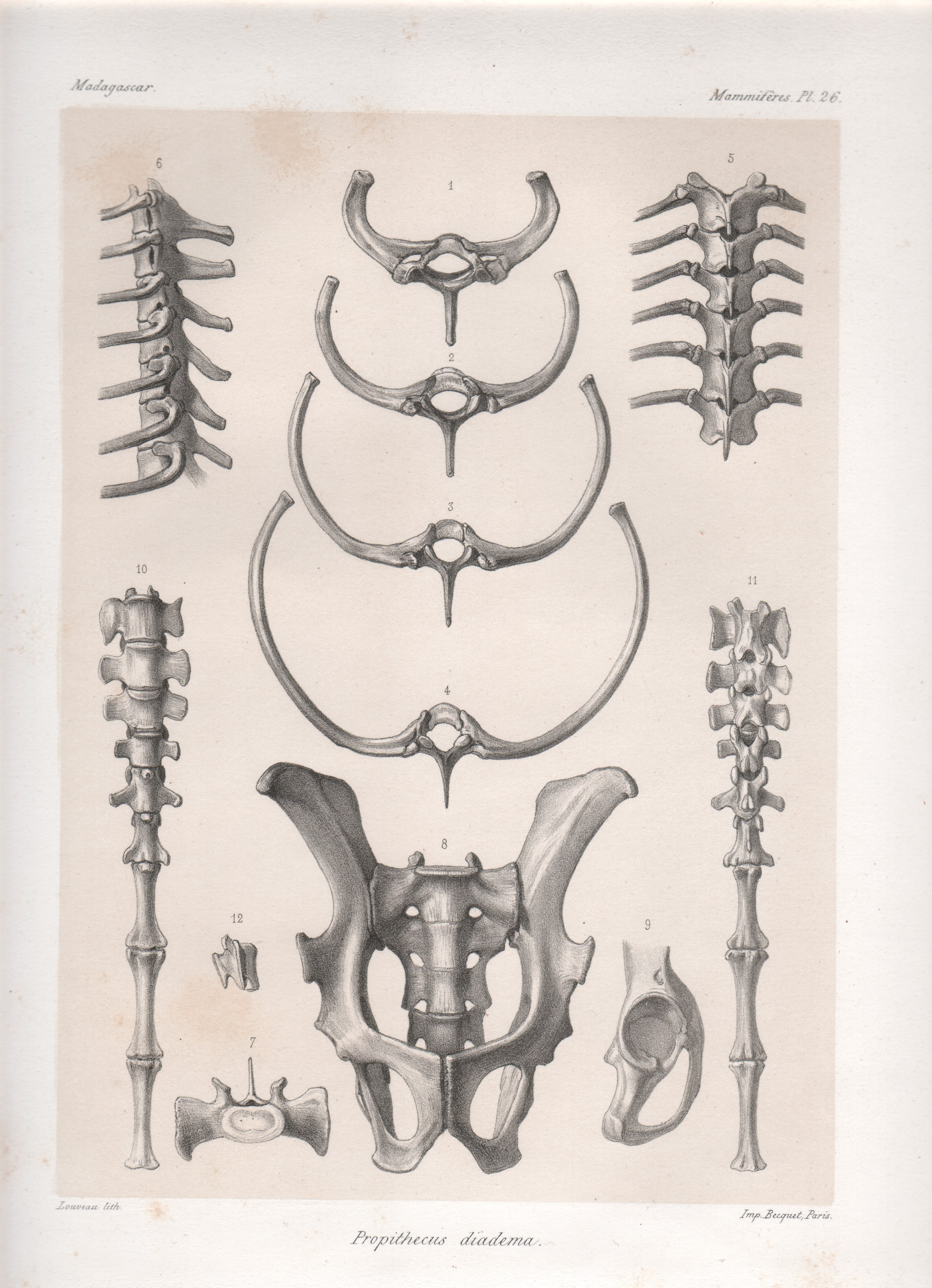 historische Darstellung der Anatomie des Skeletts eines Diademsifaka (Propithecus diadema)